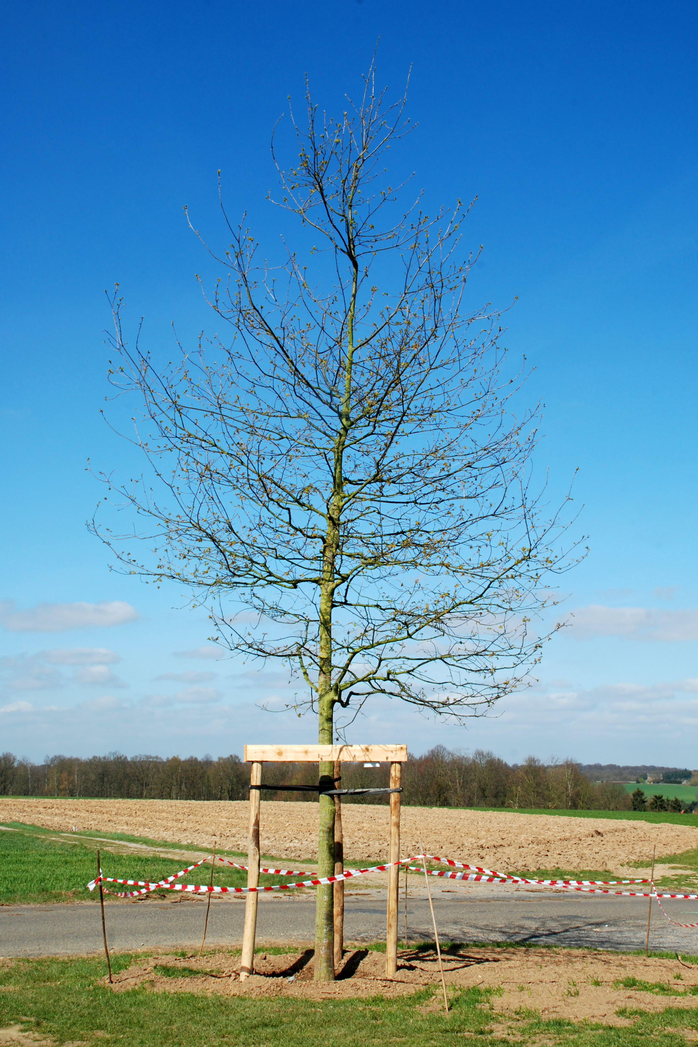 Belgique - Bousval - Chapelle du Try-au-Chêne - le jeune chêne (Quercus Robur) planté le 21 mars 2012 devant la chapelle, après la perte de l'arbre abattu par une tempête le 14 juillet 2010